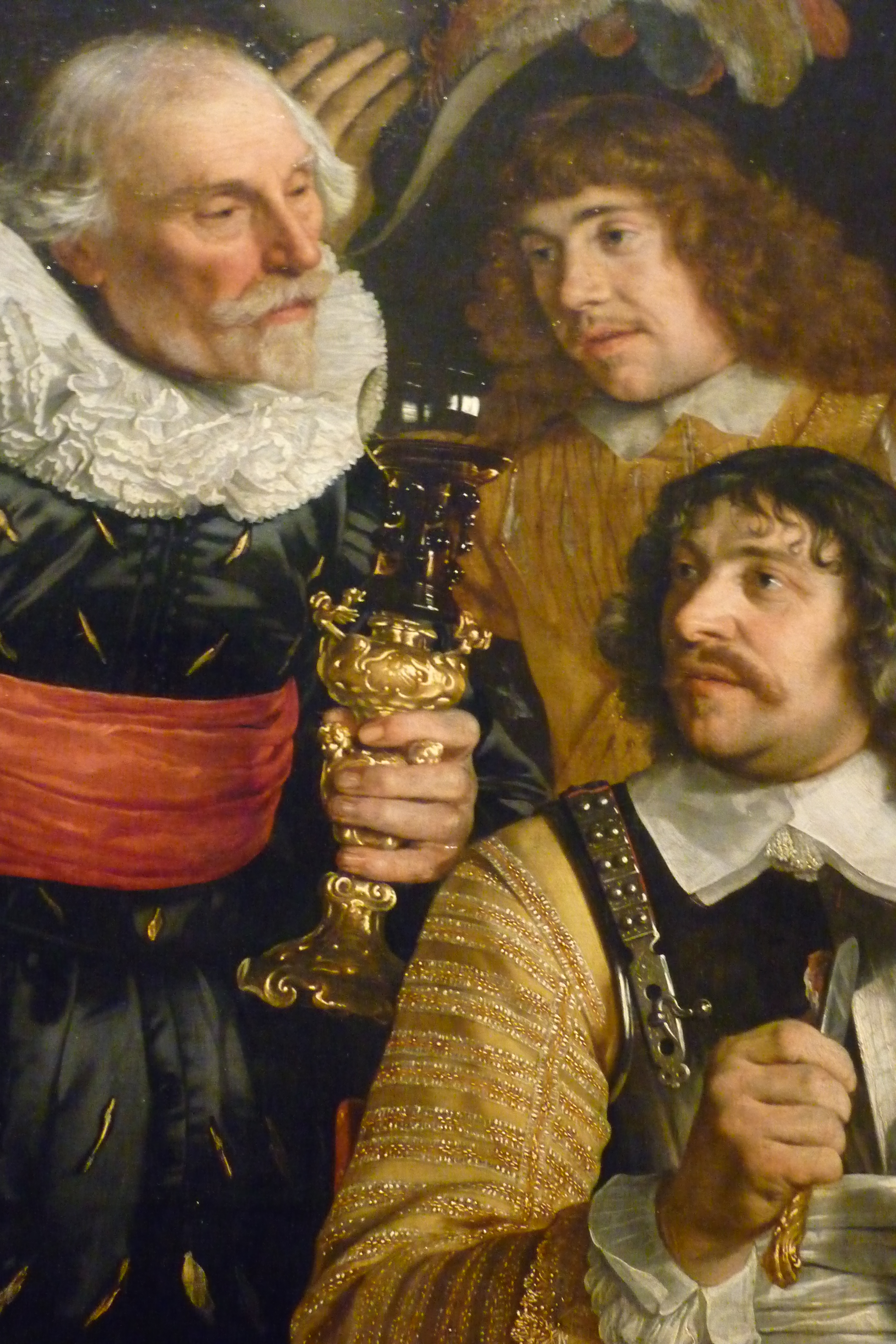 Vergulde bekerschroef, detail van Schuttersschilderij van Barth. vd Helst uit 1648, waarop de vrede tussen Spanje en de Nederlanden wordt gevierd.